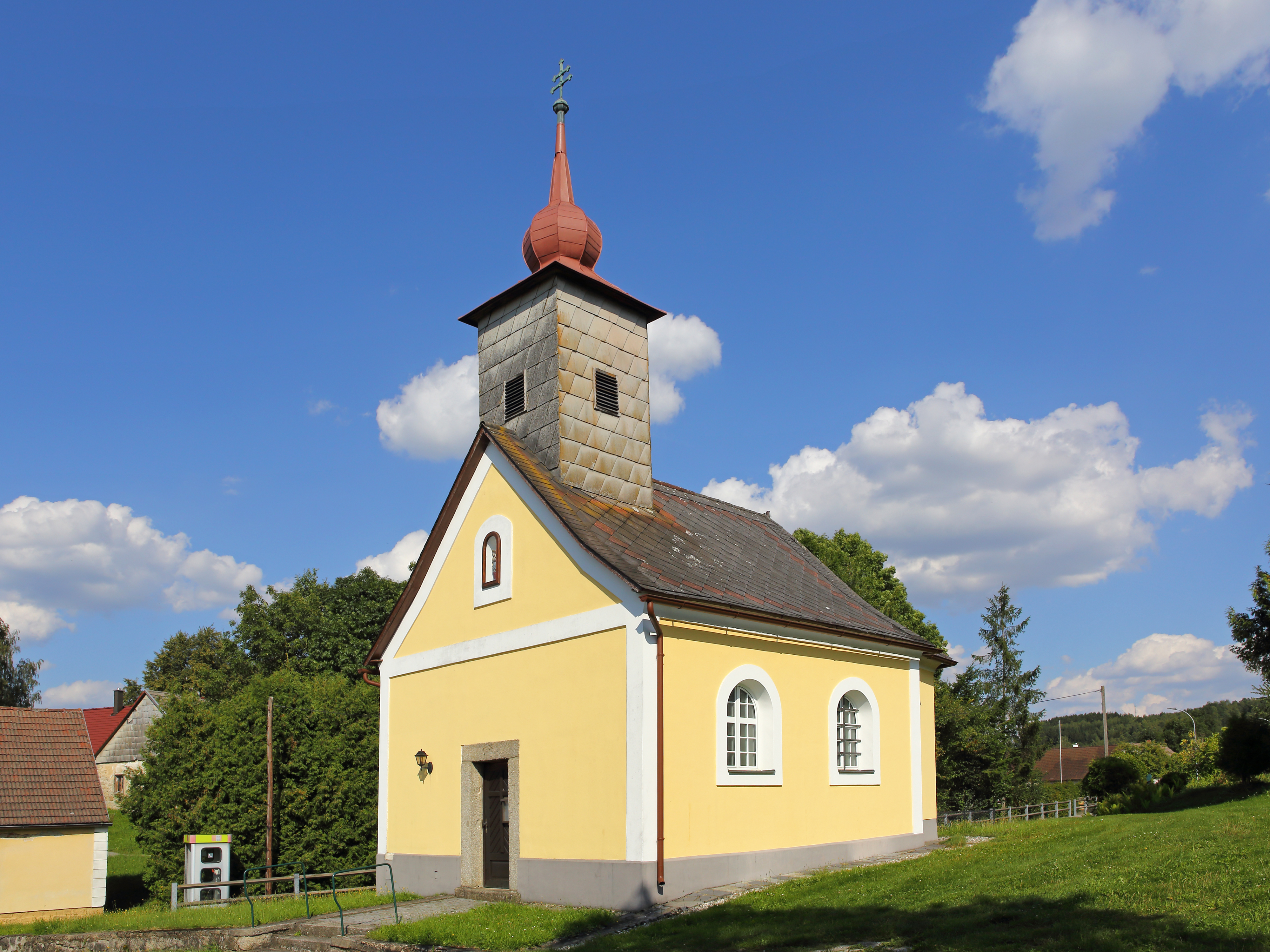 Die Ortskapelle von Altmanns (Gemeinde Heidenreichstein) wurde im Jahr 1836 errichtet.